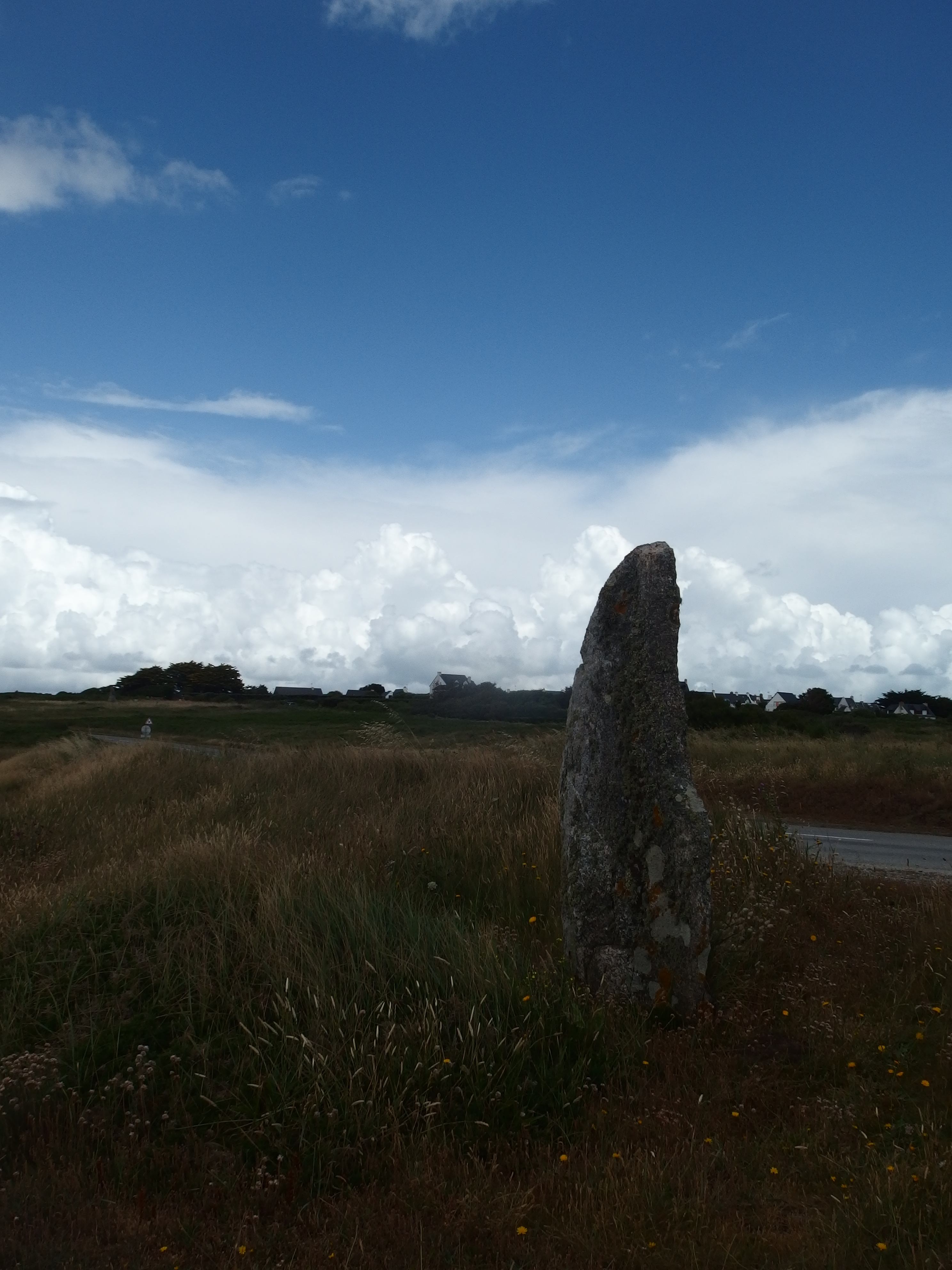 Menhir de la Pointe-de-Guéritte, à Quiberon, vu vers le nord.